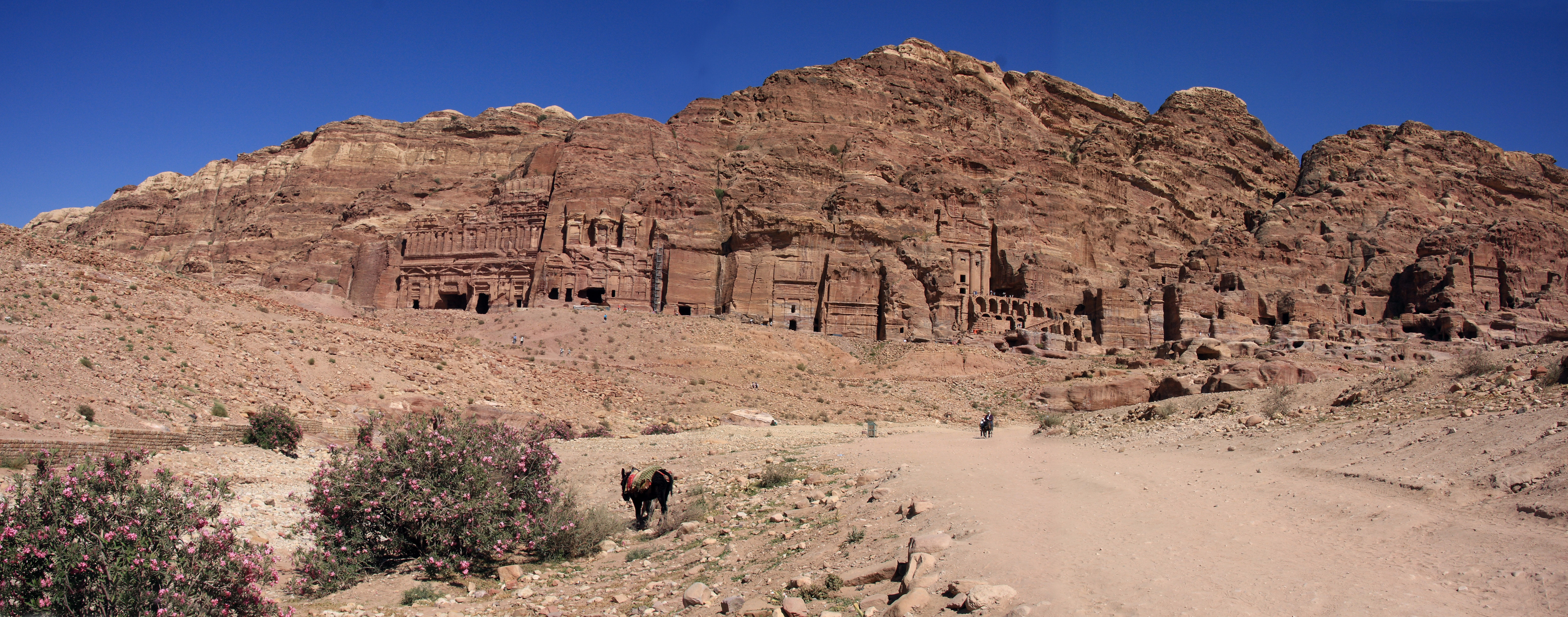 Panorama des tombes de Petra